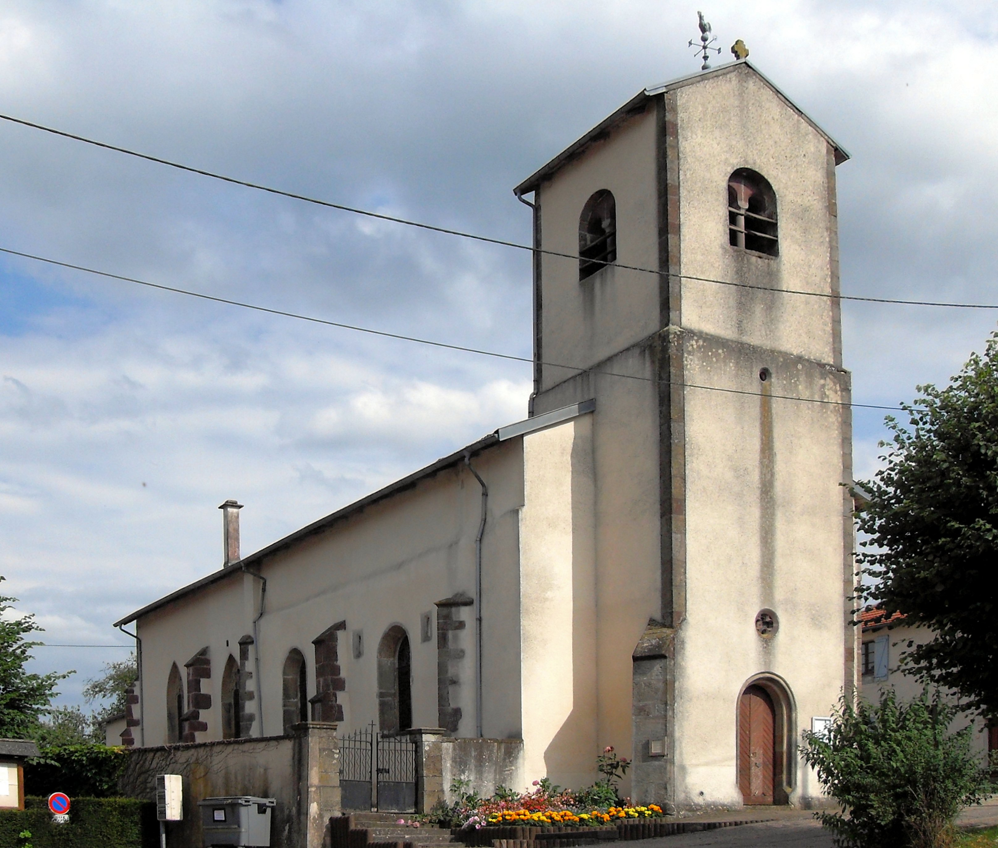 L'église Saint-Pierre-aux-Liens à Mazirot